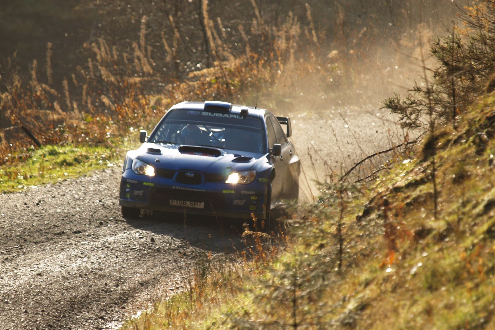 Petter Solberg driving his Subaru Impreza WRC 2007 during 2007 Wales Rally GB.